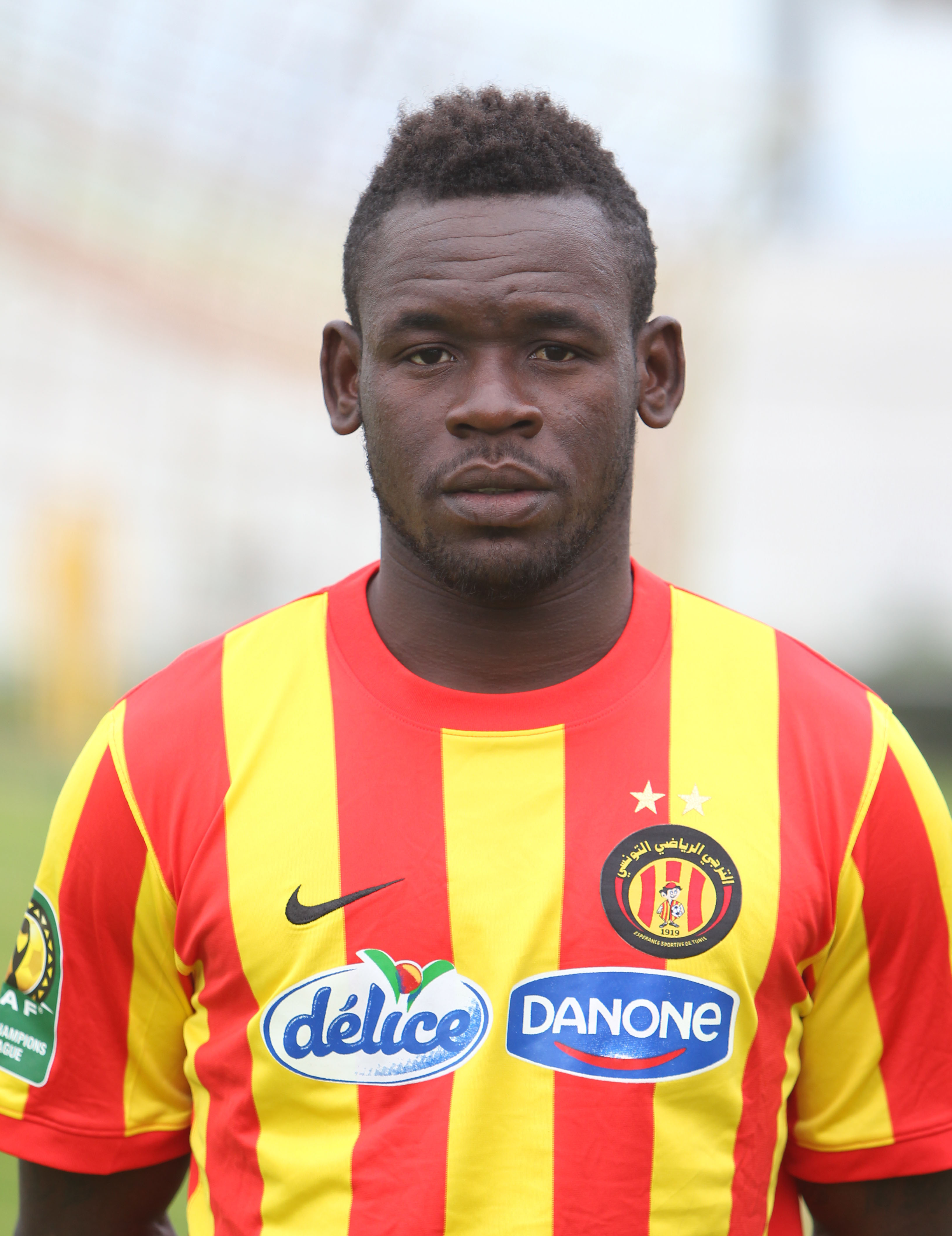 Clottey sous les couleurs de l'Esperance Sportive de Tunis